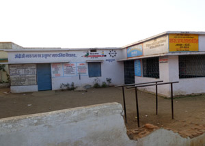 hi:बंडोल: प्राथमिक शाला बंडोल स्थापना वर्ष 1922